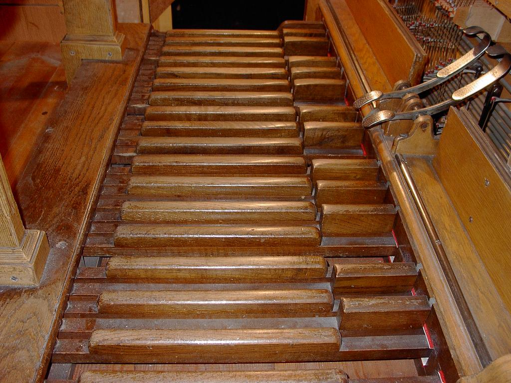 Organ in Pazardjik Concert Hall, Bulgaria